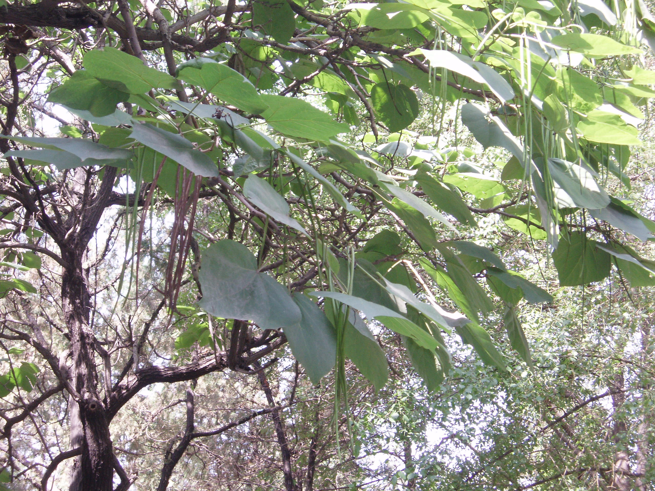 Chinese catalpa trees